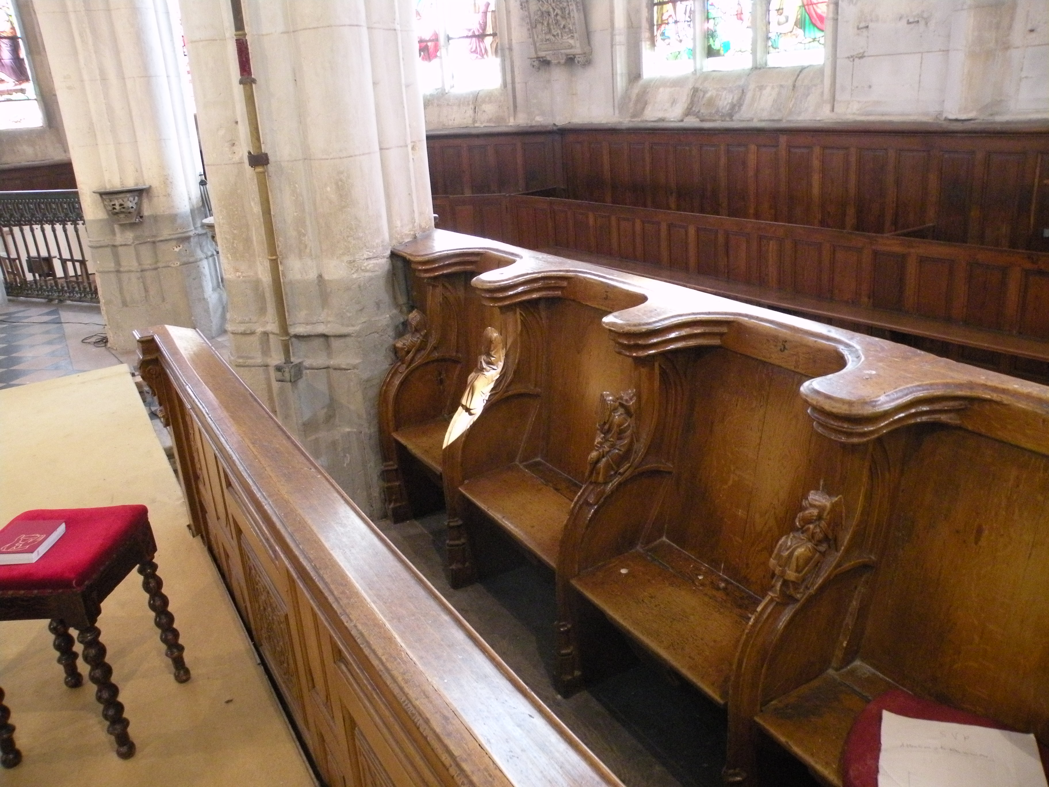 stalle église Chaumont en Vexin